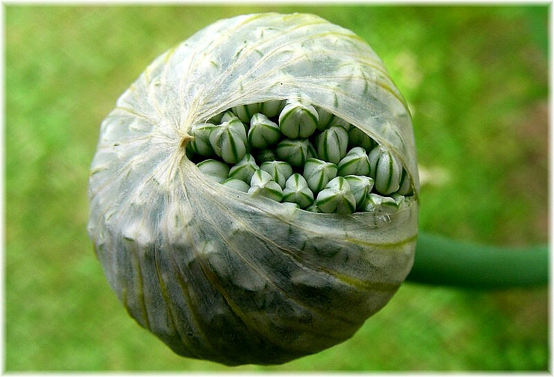 Flor de cebola, Oleiros, Galiza